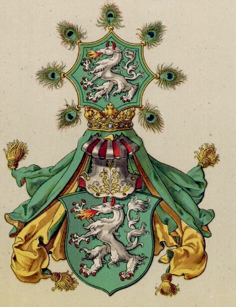 Stájerország címere